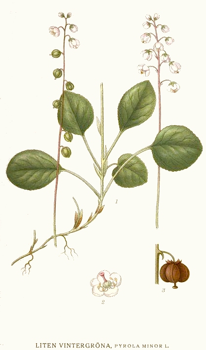 Original Description Liten Vintergröna, Pyrola minor L.